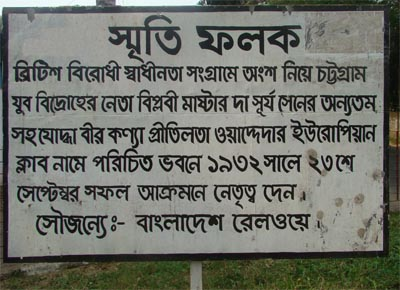 আত্নহত্যার স্মৃতিফলক।